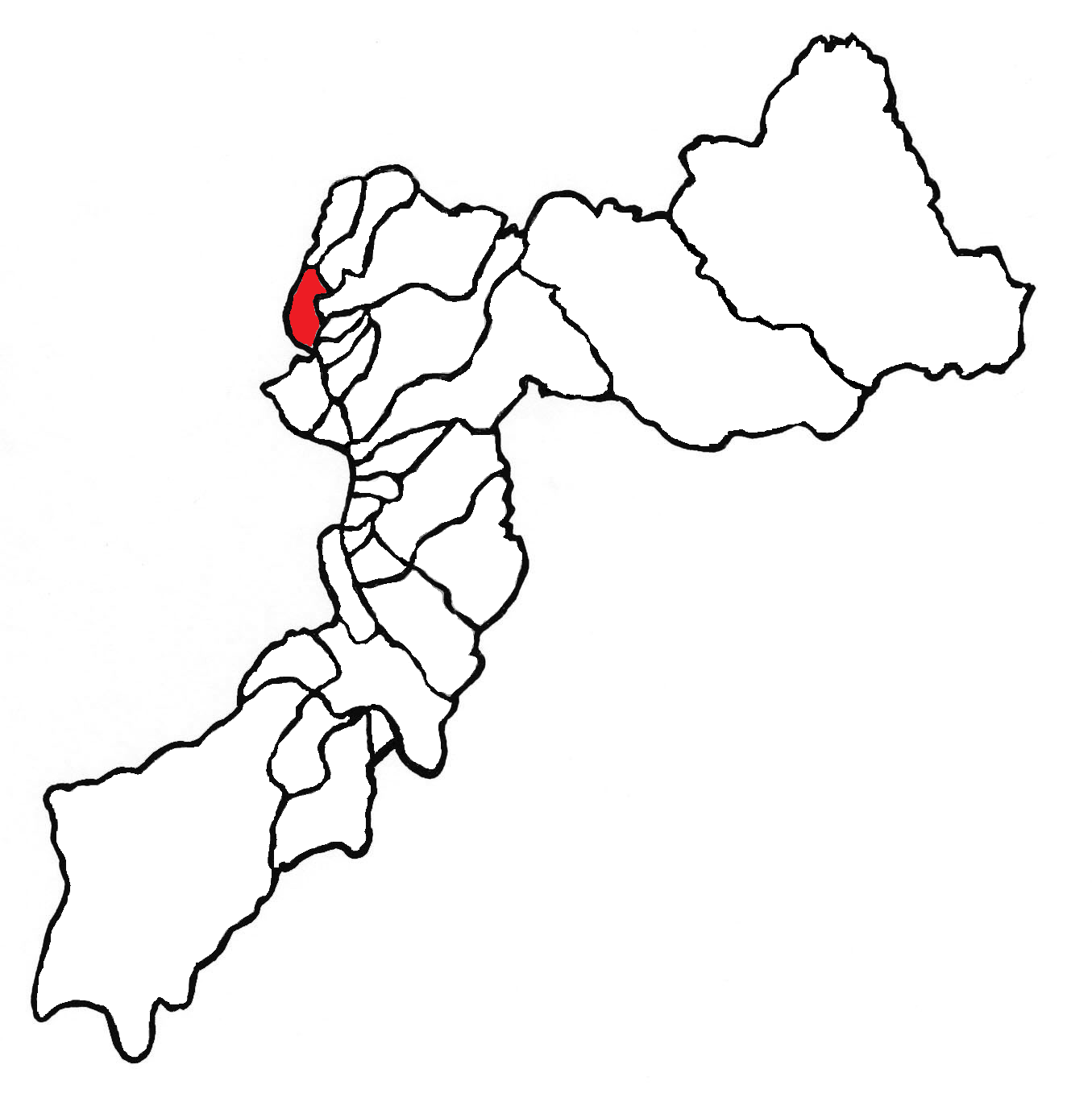 Ubicación del distrito en la provincia de Huancayo, departamento de Junín, Perú